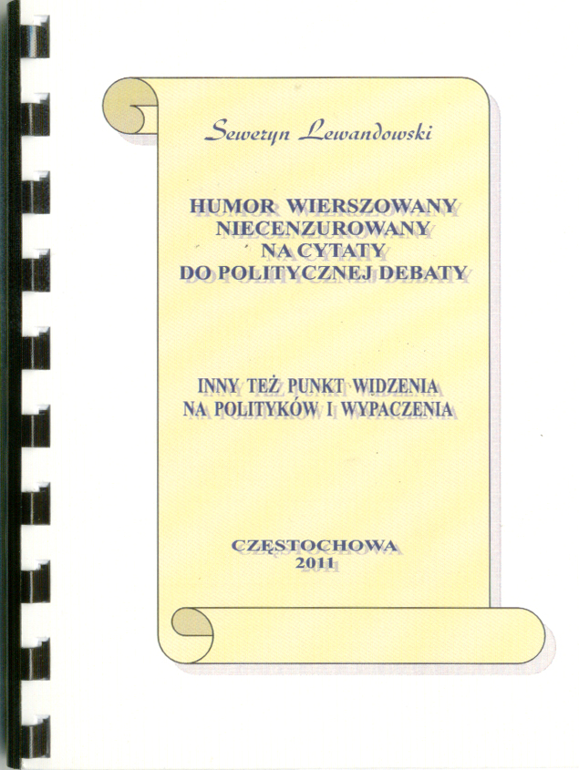 Humor wierszowany ... Na cytaty do politycznej denaty